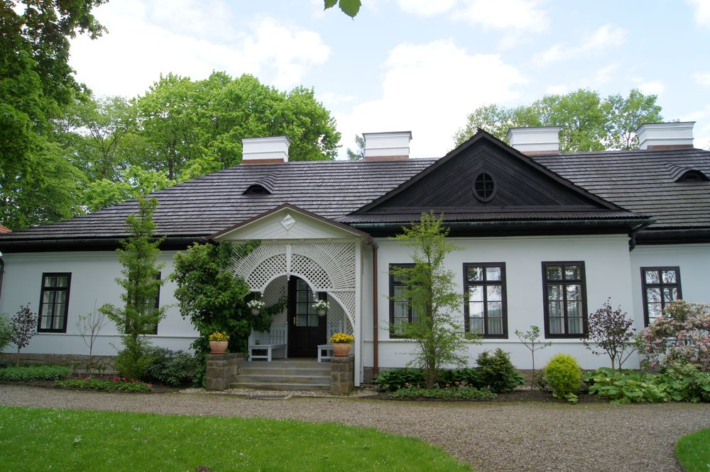 Dwór Pendereckich w Lusławicach